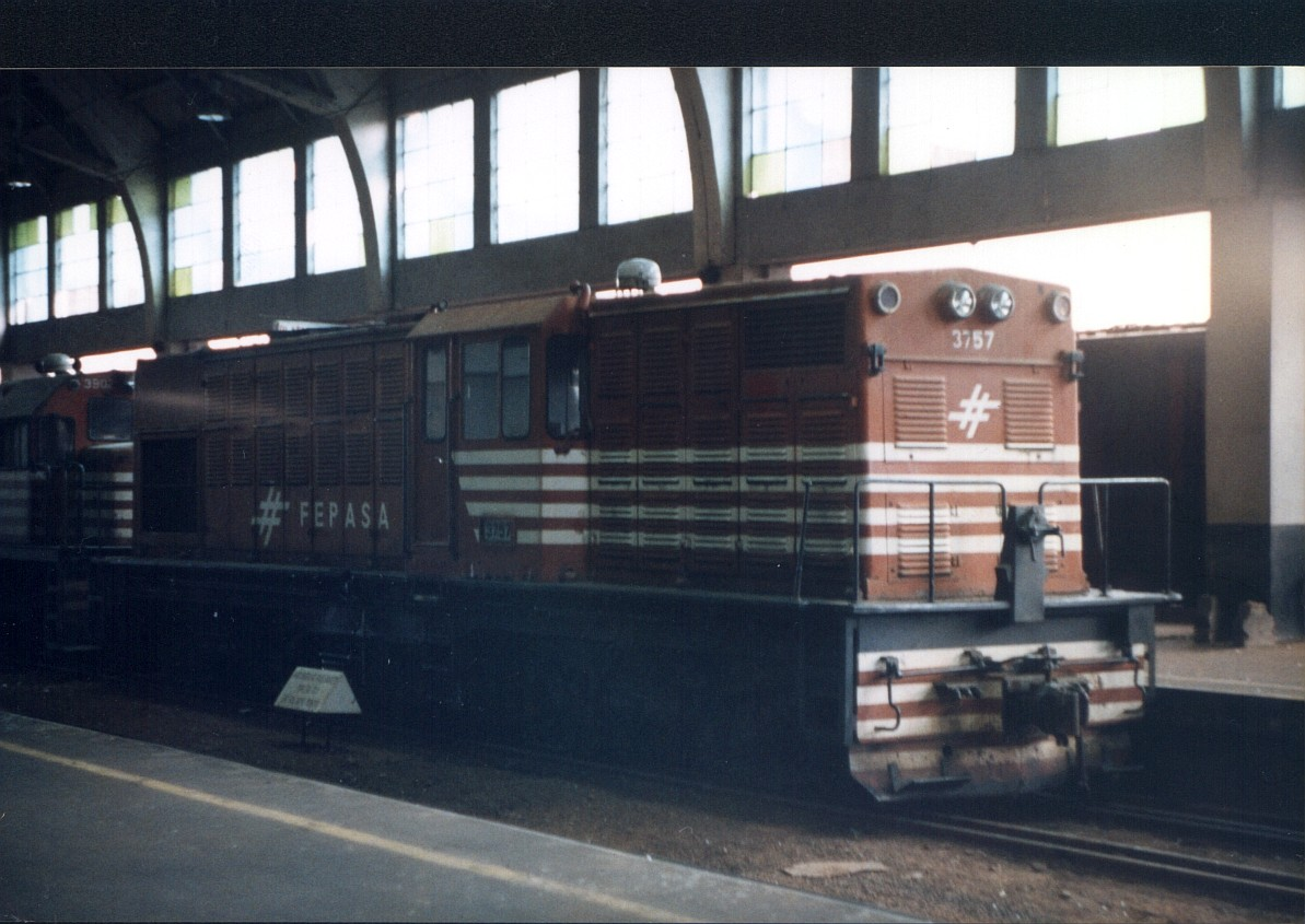 LEW DE III M FERROBAN #3757 - Triagem Paulista - Bauru-SP-Brasil. Locomotiva ainda ostentava a pintura da FEPASA